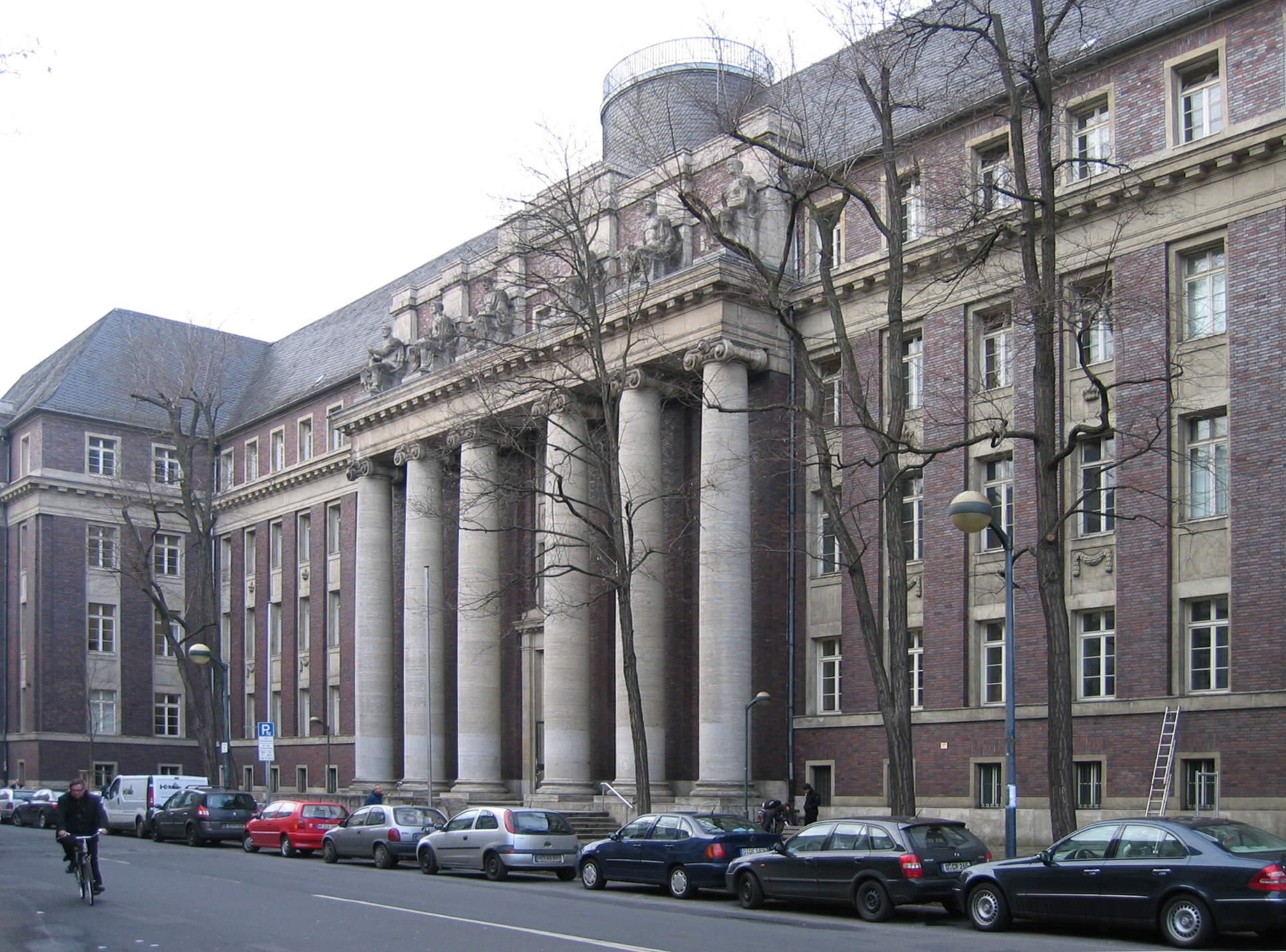 das Altbau des Landgerichts Düsseldorf